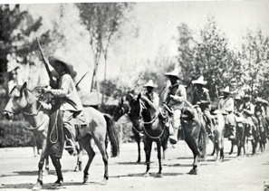 Entrada de la caballería constitucionalista a Paseo de la Reforma.